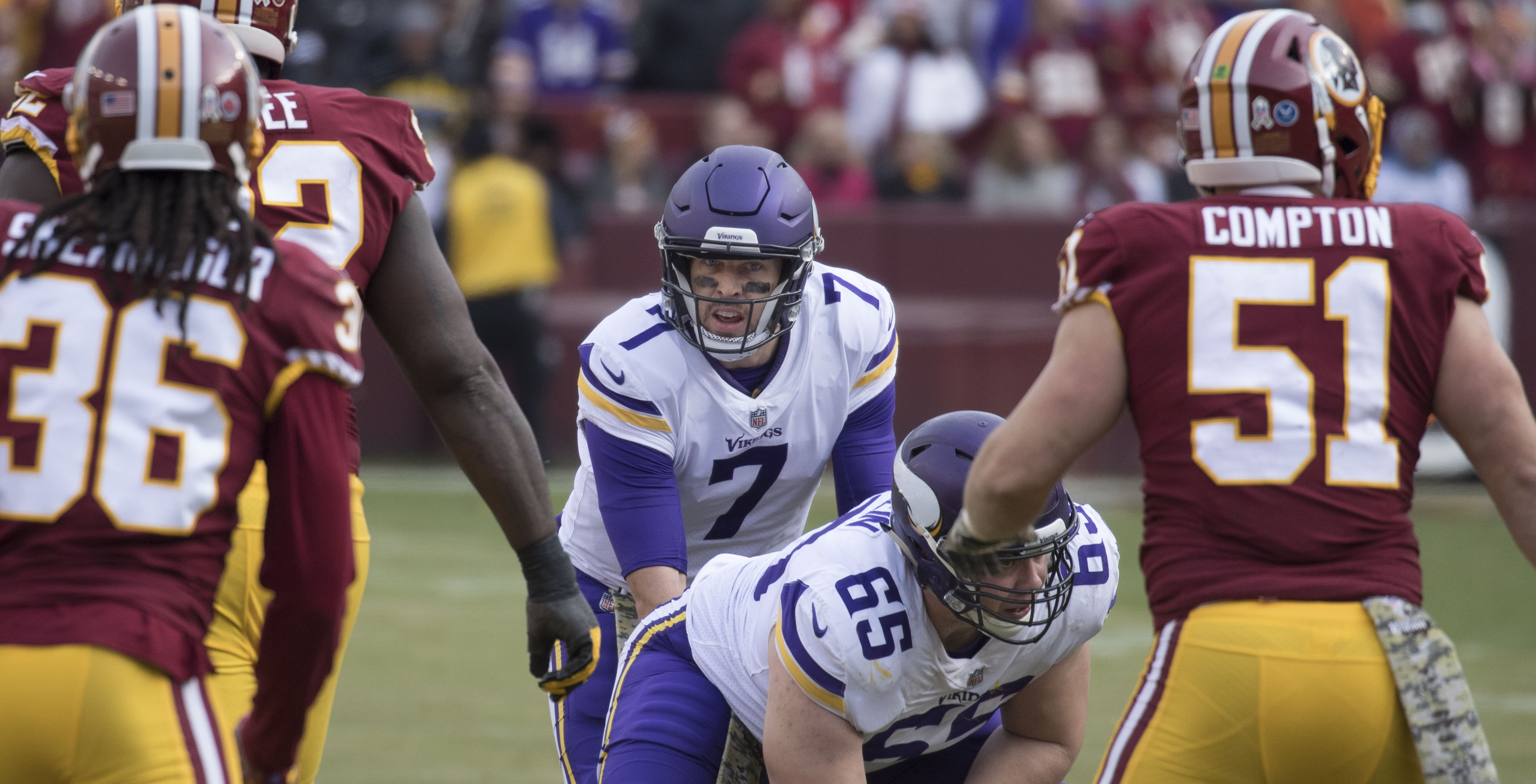 Vikings at Redskins 11/12/17